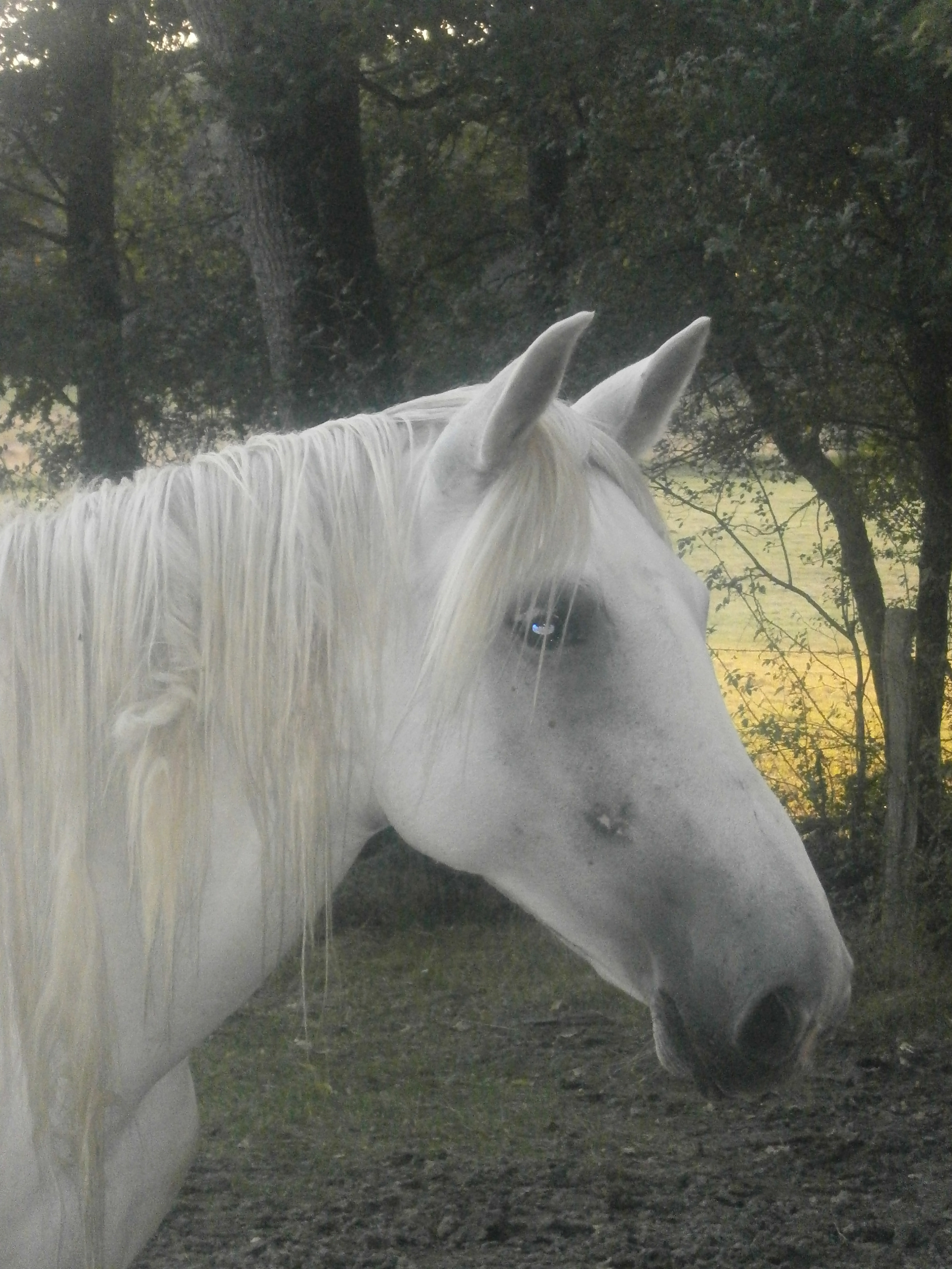 Juments lusitaniennes dans une pâture en Auvergne